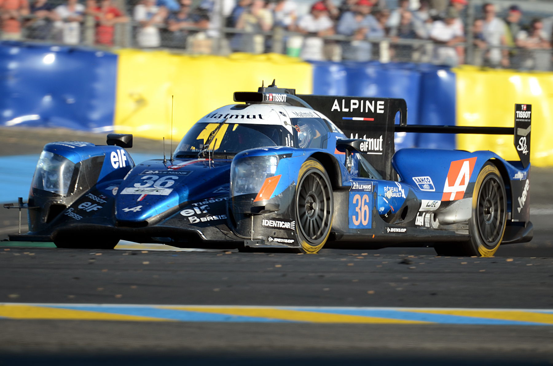 Alpine A470 - Gibson - Ecurie Signatech Alpine Matmut